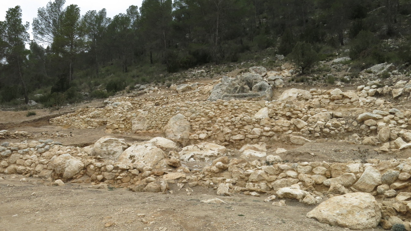 Jaciment la Solana de las Pilillas (època ibera, segle V abans de Crist), situat en Los Duques, pedania del municipi valencià de Requena.